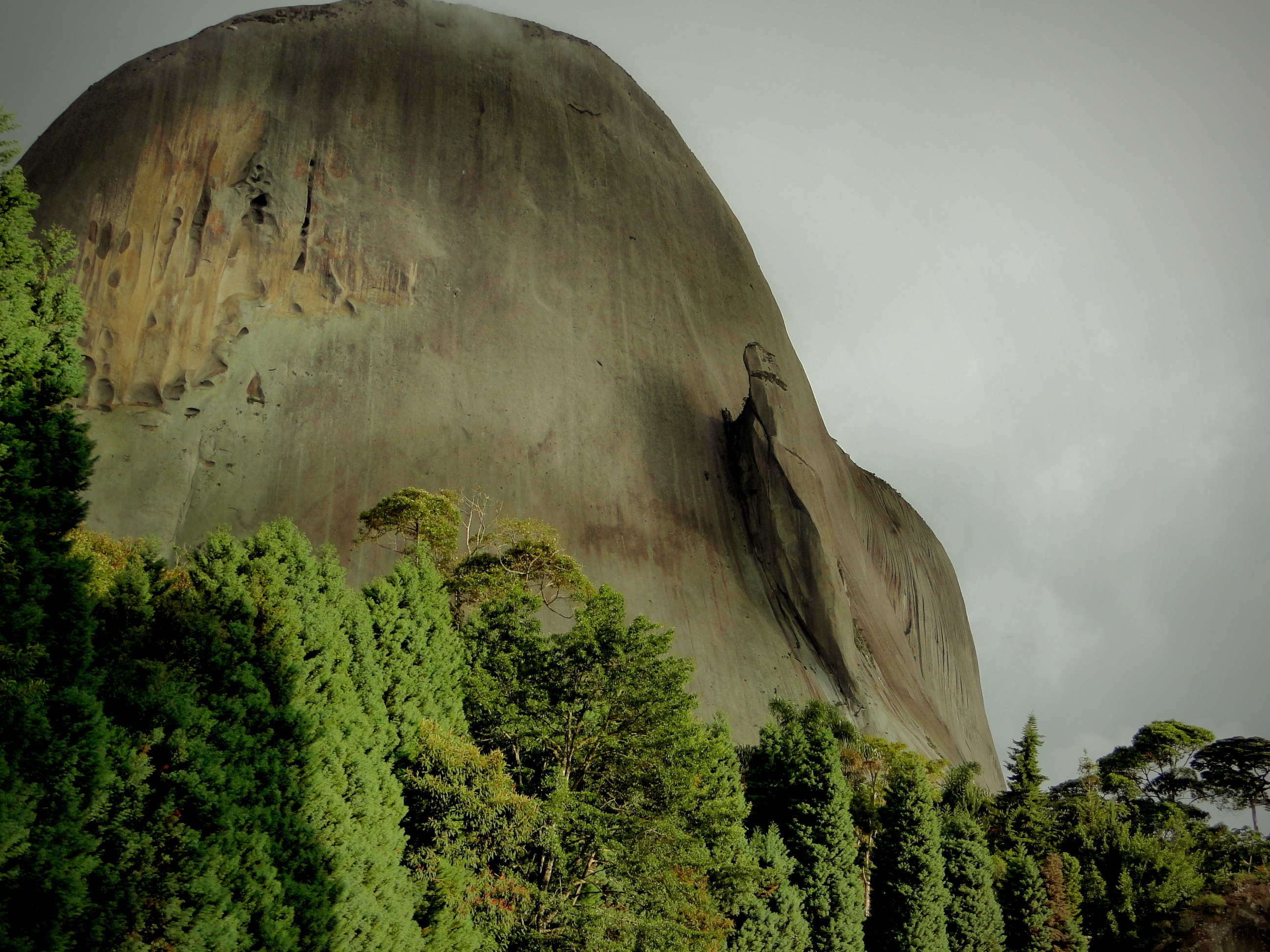 Pedra Azul em Fevereiro de 2010.